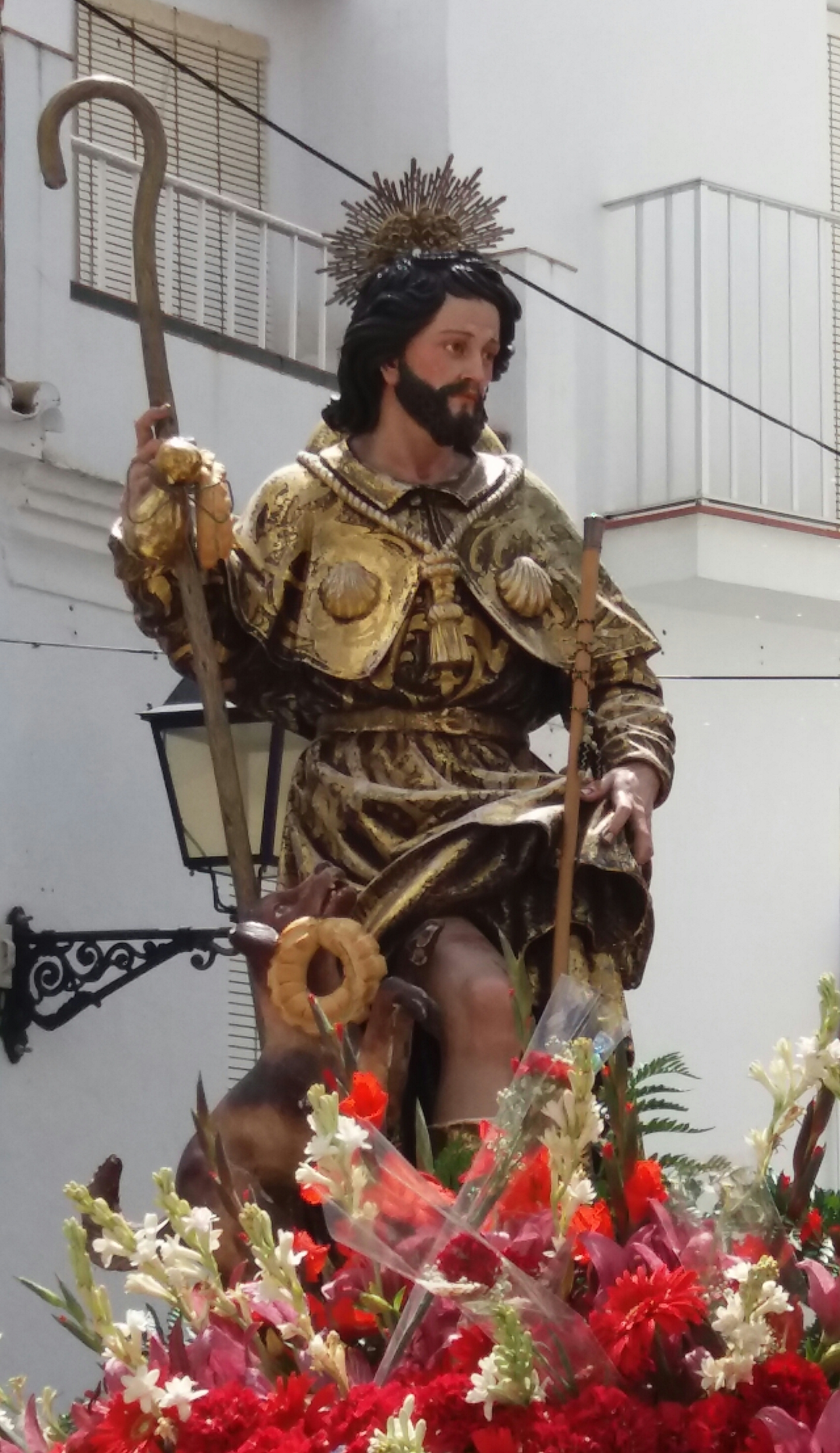 Talla de San Roque, que se conserva en la Iglesia de San Miguel Arcángel de Tolox (Málaga, España). Realizada en 1969 por el taller d Francisco Buiza, sale en procesión cada 16 de agosto, en una fiesta conocida como la "Cohetá". La fotografía corresponde a la "Cohetá" de 2016.